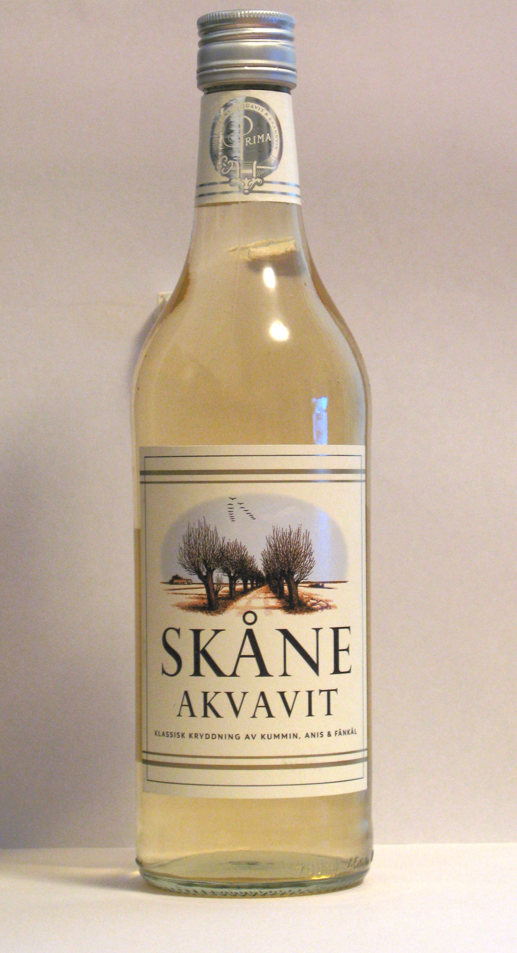 Pullo Skåne Akvavitia.